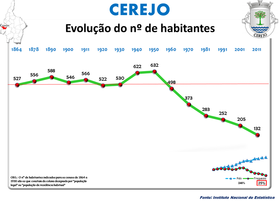 Censos 1864/2011